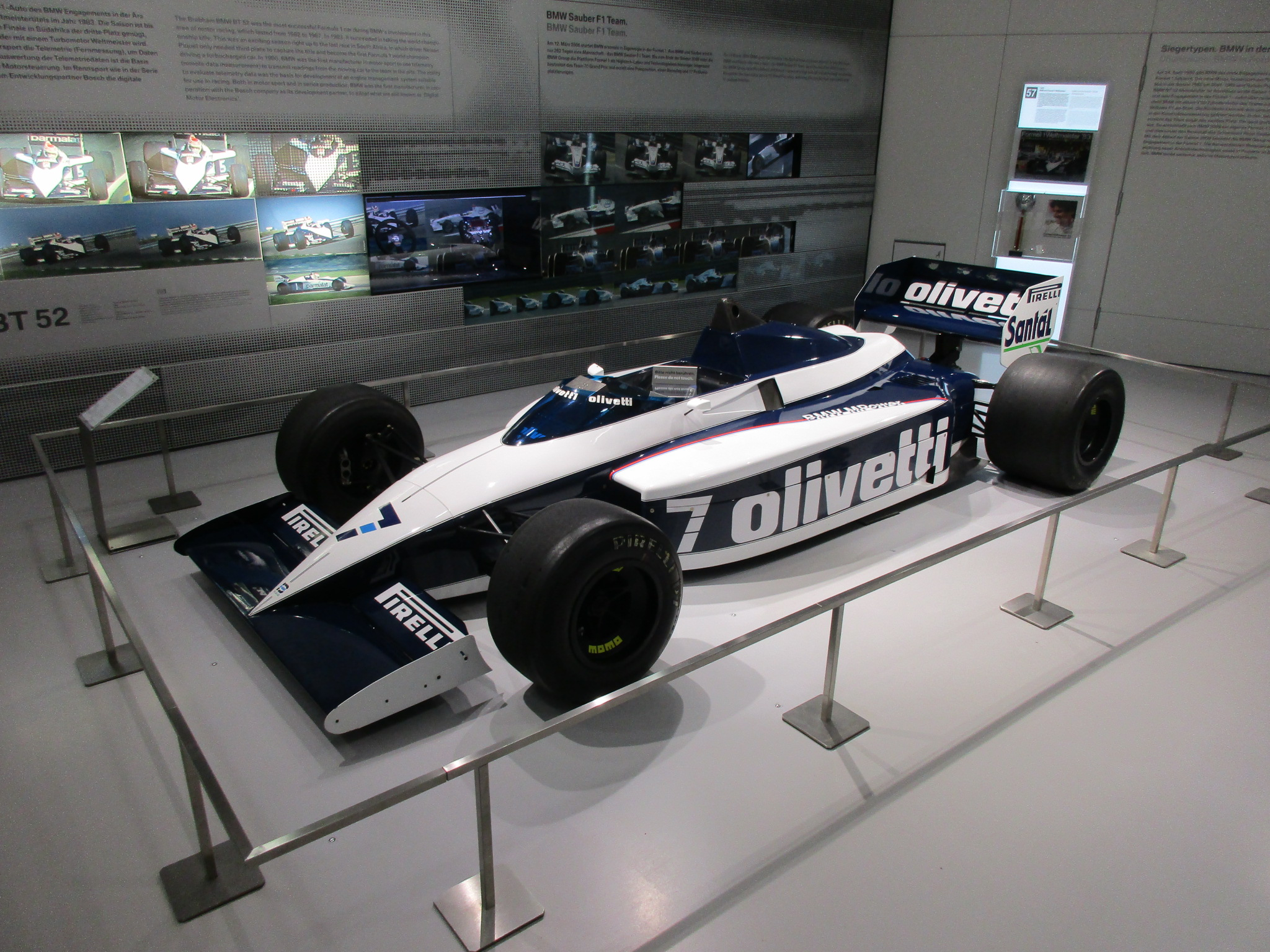 Brabham BMW BT54 Turbo 1985, du Musée BMW de Munich (des pilotes Nelson Piquet, François Hesnault, Marc Surer) victorieuse avec Piquet du Grand Prix automobile de France 1985 au Circuit Paul Ricard du Castelet